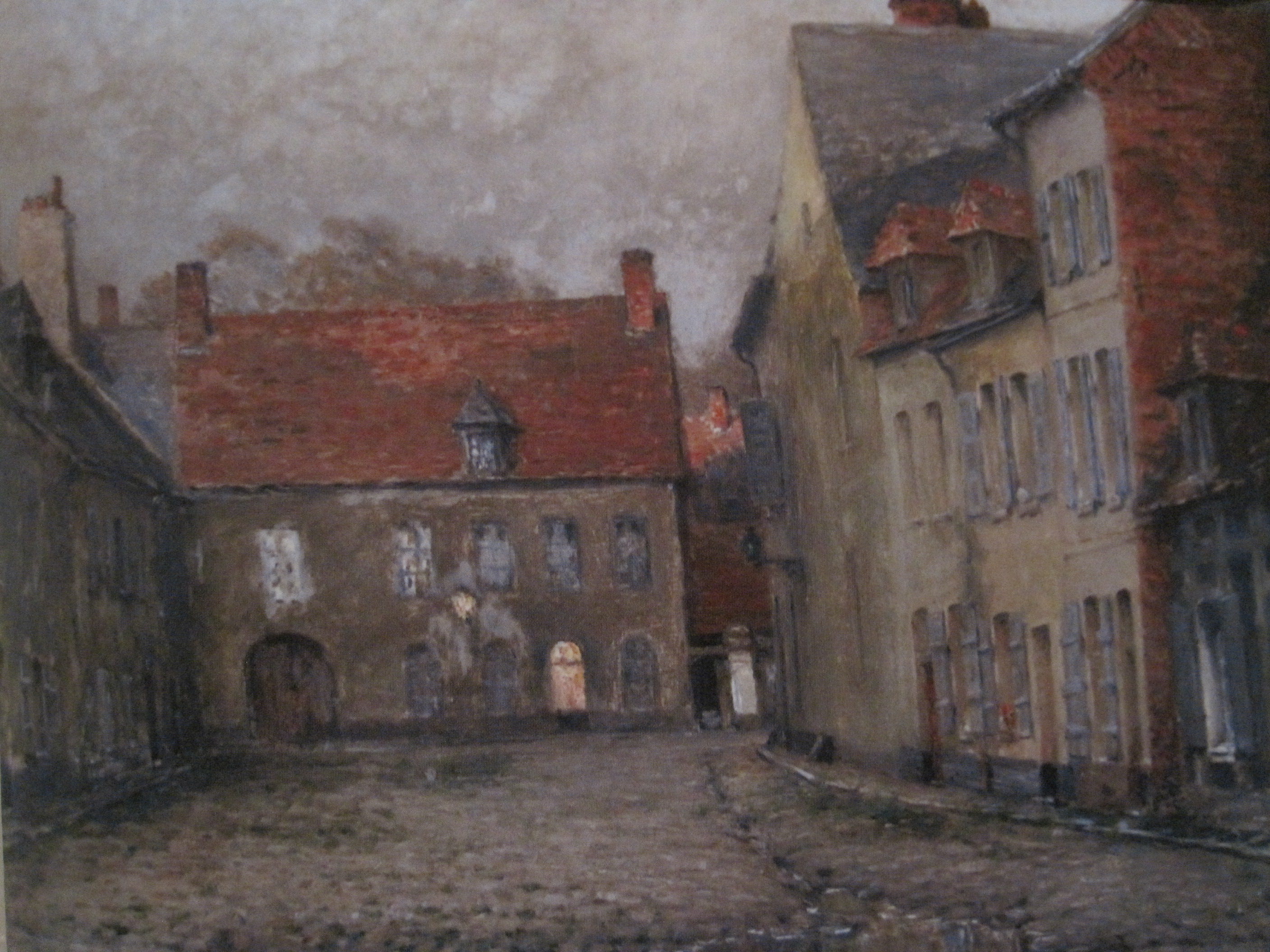 Portrait d'une place publique dans une ville de France